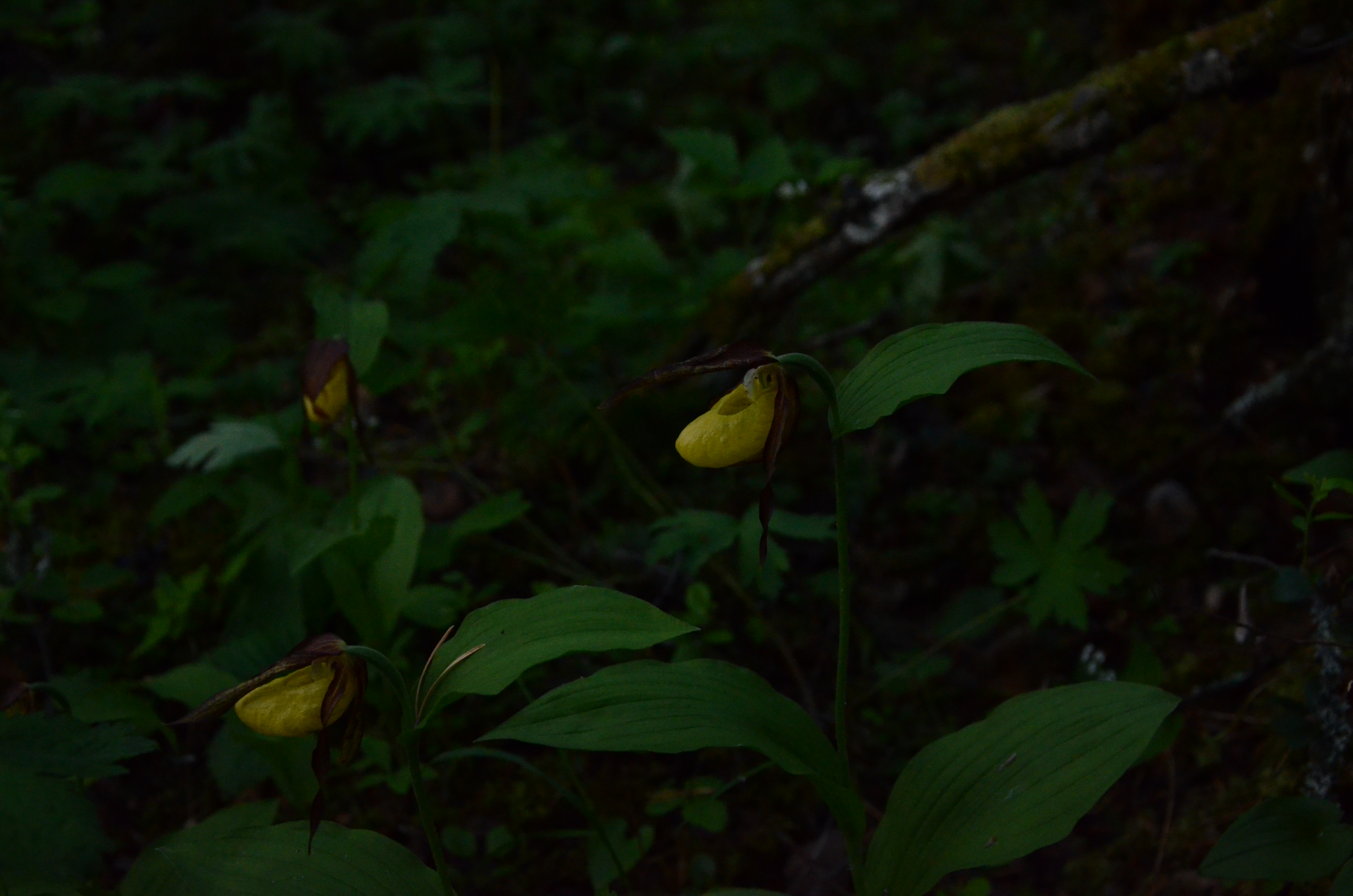 Cypripedium, произрастающий на полуострове Киндо